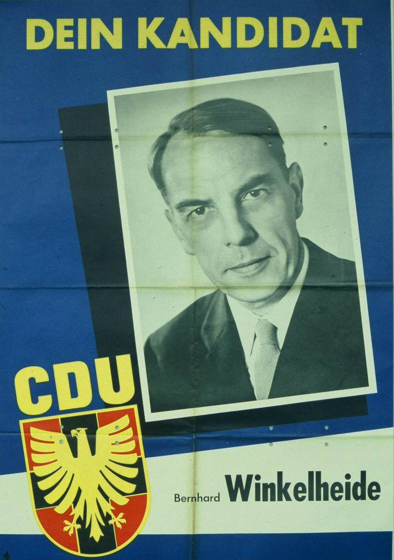 Dein Kandidat Abbildung: Porträtfoto Plakatart: Kandidaten-/Personenplakat mit Porträt Objekt-Signatur: 10-001: 659 Bestand: Plakate zu Bundestagswahlen (10-001) GliederungBestand10-18: Plakate zu Bundestagswahlen (10-001) » Die 3. Bundestagswahl am 15. September 1957 » CDU » Mit Porträtfoto Lizenz: KAS/ACDP 10-001: 659 CC-BY-SA 3.0 DE